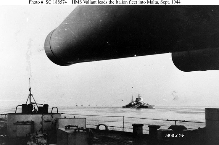 Photo #: SC 188574 Italian Fleet arrives at Malta, 10 September 1943 HMS Valiant leads the line as the Italian fleet steams into Malta, under the terms of the Italian Armistice. The scene is framed by the after 15-inch guns of HMS Warspite. Photograph from the Army Signal Corps Collection in the U.S. National Archives.